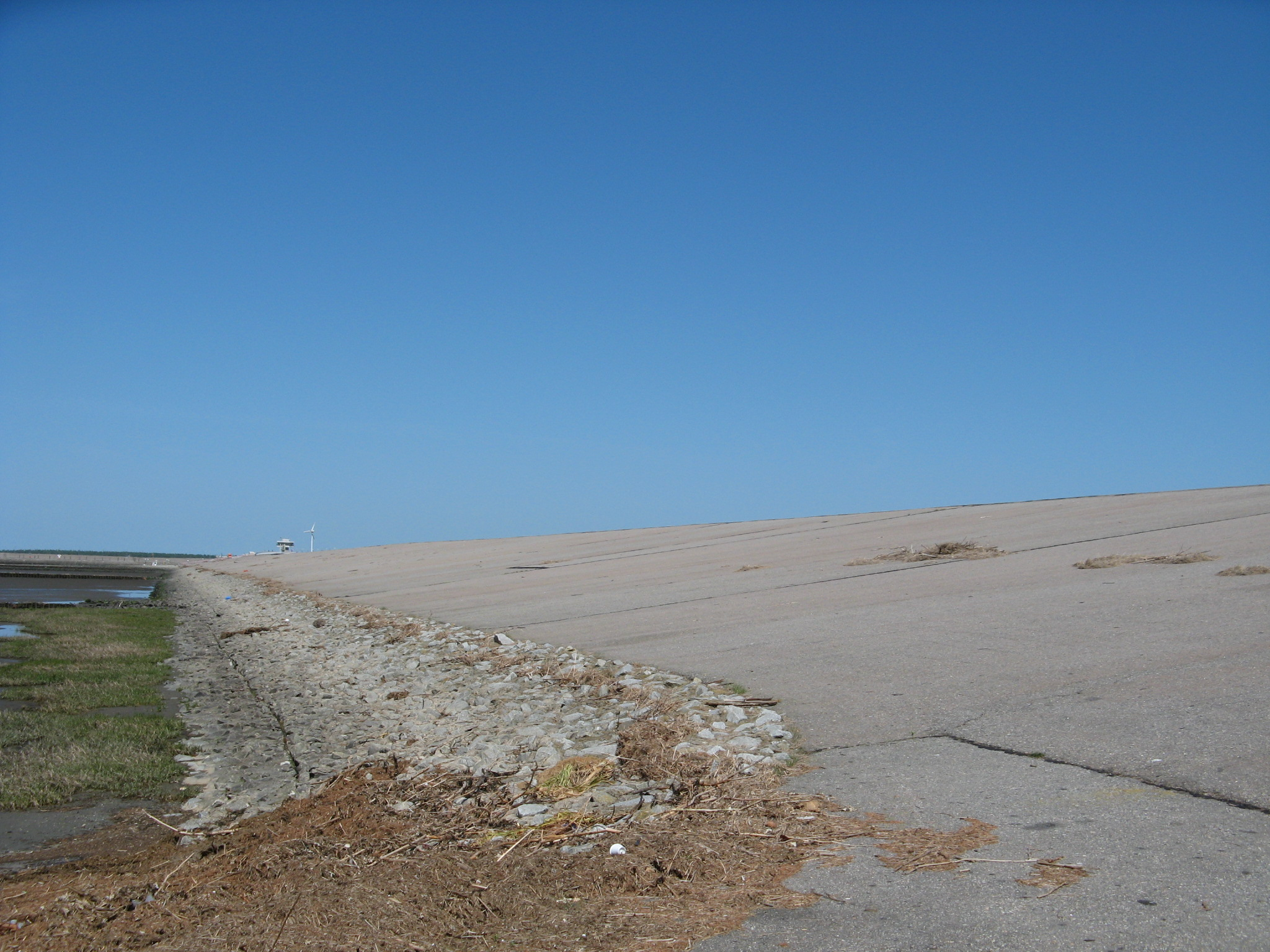 Dike Wesselburenerkoog